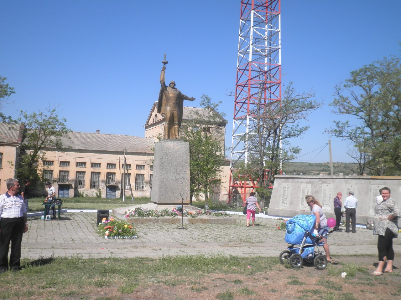 Братська могила 145 радянських воїнів, загиблих при звільненні села в 1944 р. Стела, село Благоєве, центр села